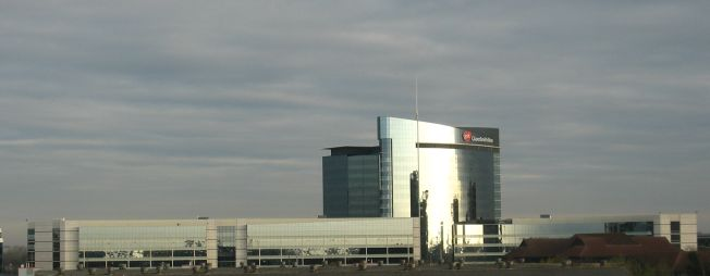 Konzernzentrale von GlaxoSmithKline in London